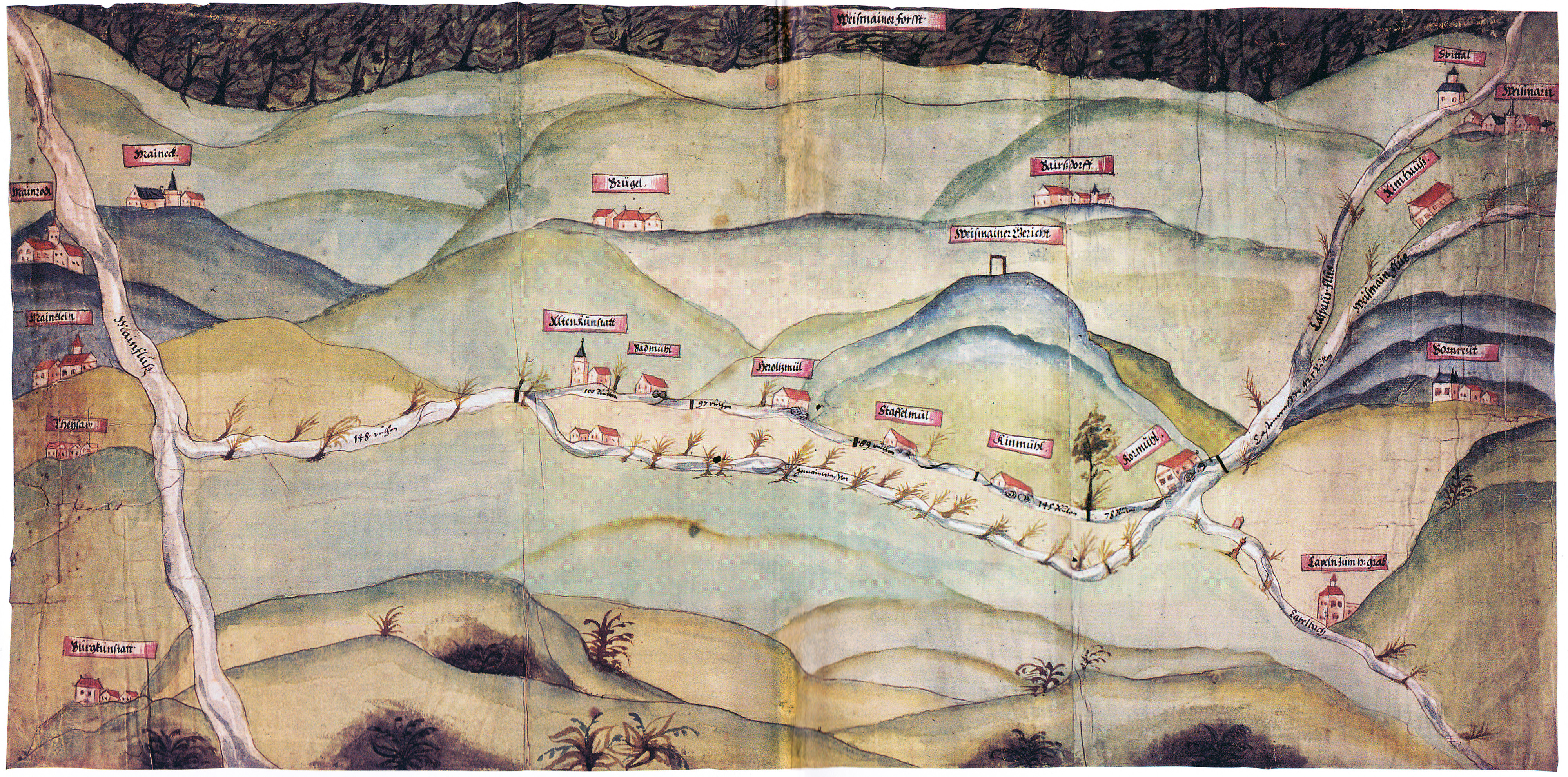 Karte über das "Weismainer Fischwasser" mit Verlauf der Weismain, angerenzenden Flüssen und Bächen, wie dem Main, und eingezeichneten Ortschaften und Mühlen.